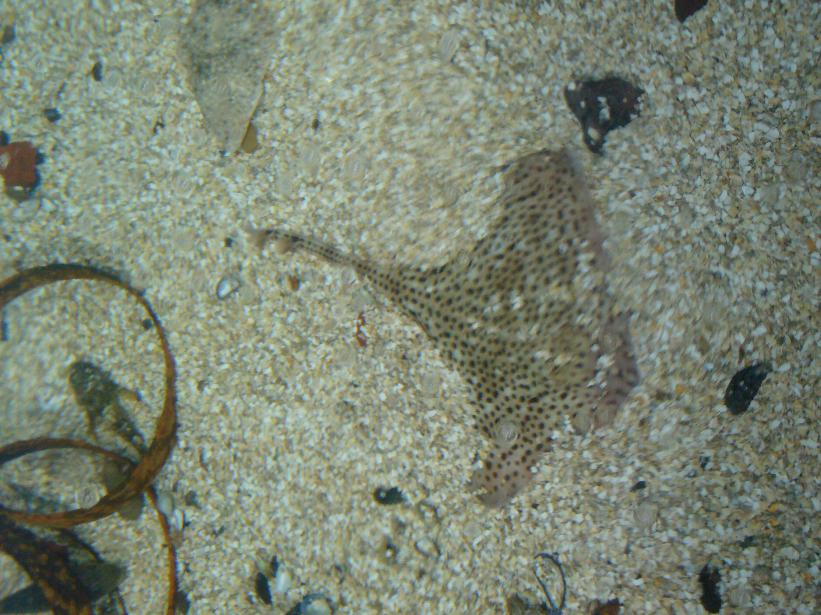 Raja montagui (Gefleckter Rochen)